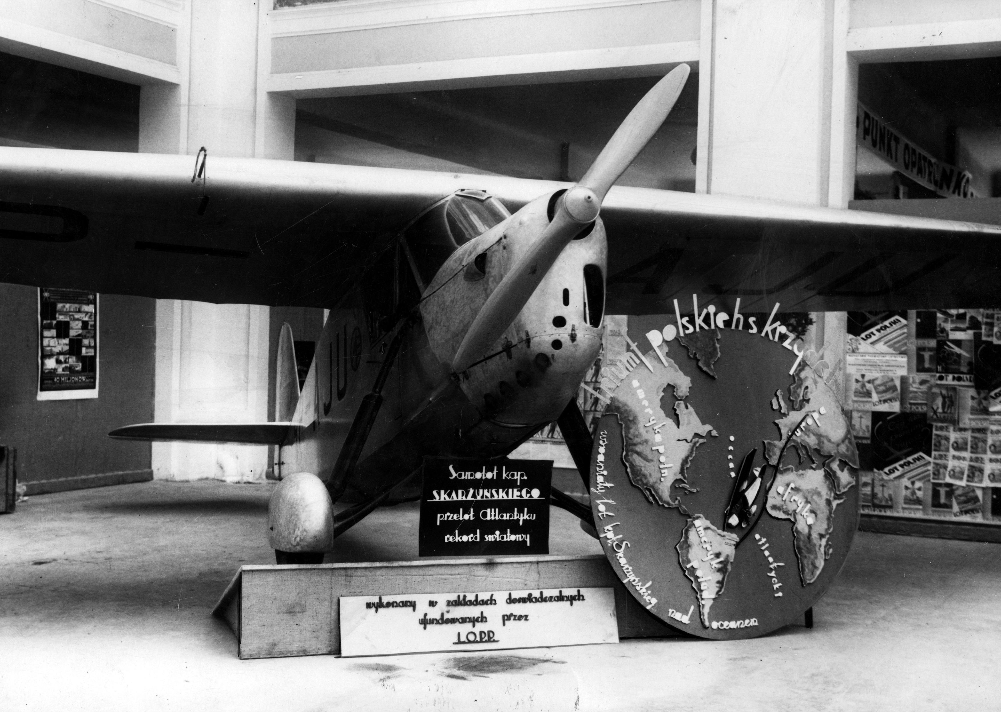 Samolot kap. Skarżyńskiego, przelot Atlantyku, rekord światowy wykonany w zakładach doświadczalnych ufundowanych przez LOPP TRIUMF POLSKICH SKRZYDEŁ